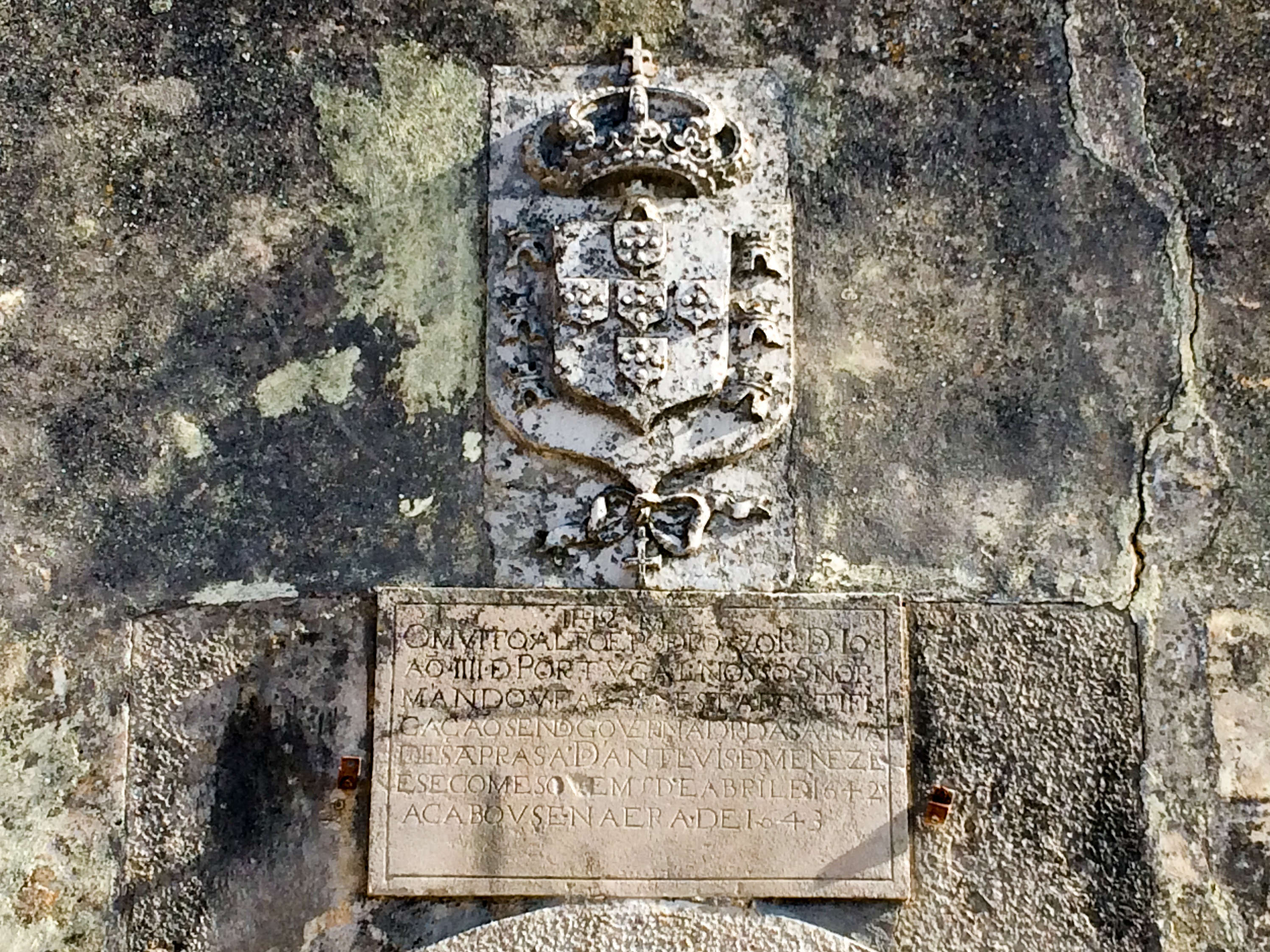 Brasão de armas e lápide sobre a porta de entrada do forte.